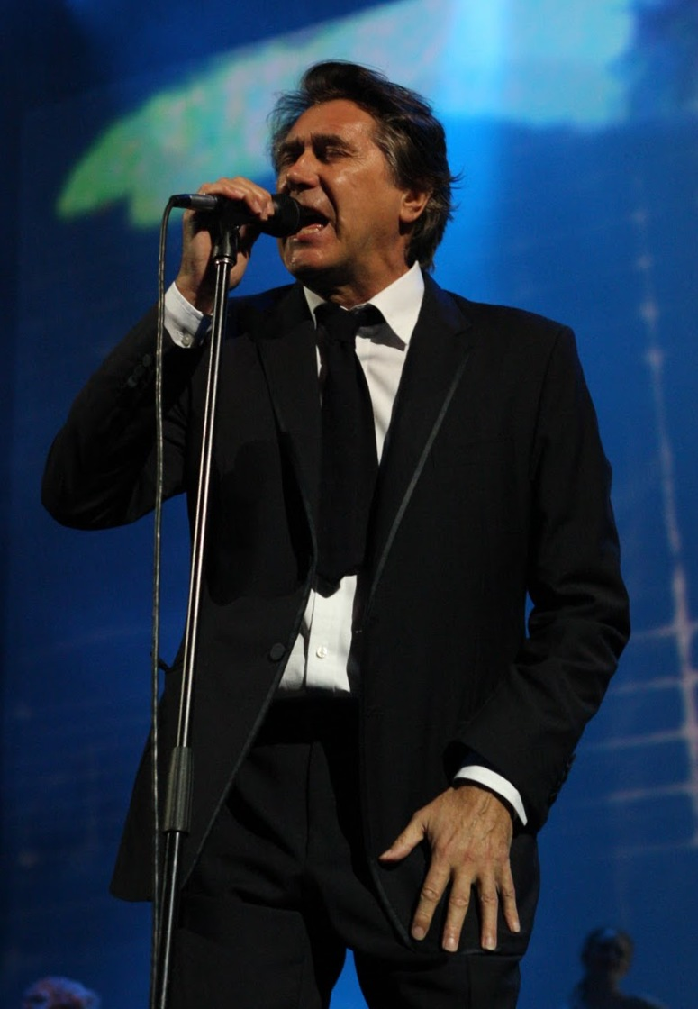 Bryan Ferry